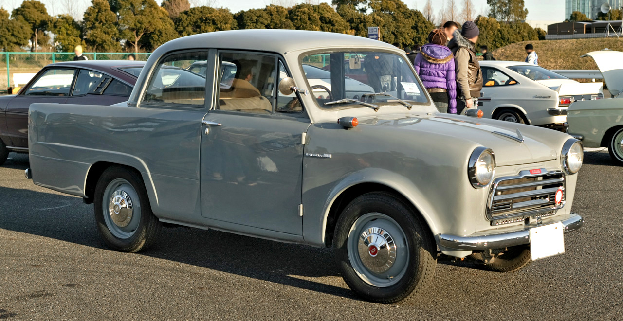 Datsun Pickup 1000 (Datsun U220 Ranch Sedan)